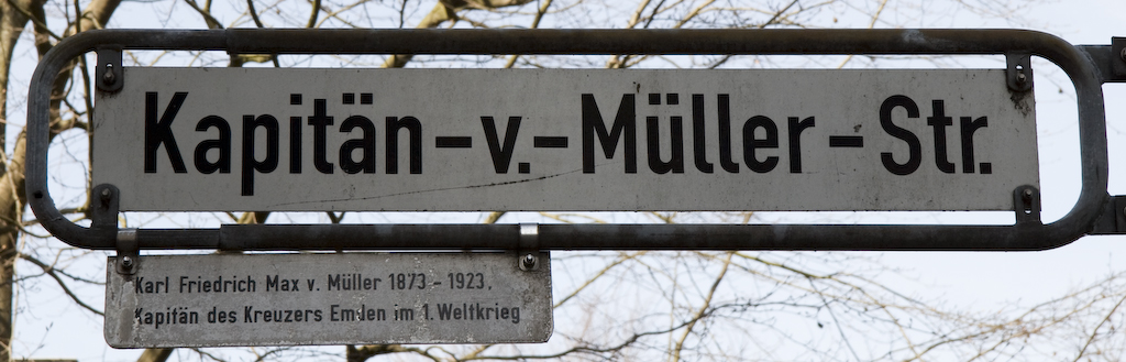 Fotographie des Straßenschilds der Kapitän-von-Müller-Straße in Hannover